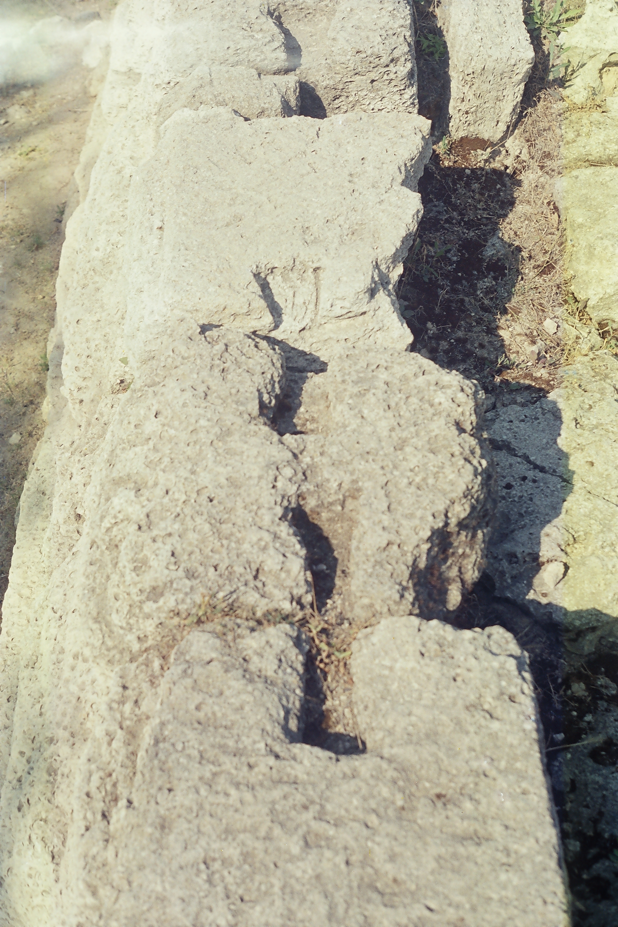 Калос Лимен. Способ кладки стен из каменных блоков методом "ласточкин хвост"